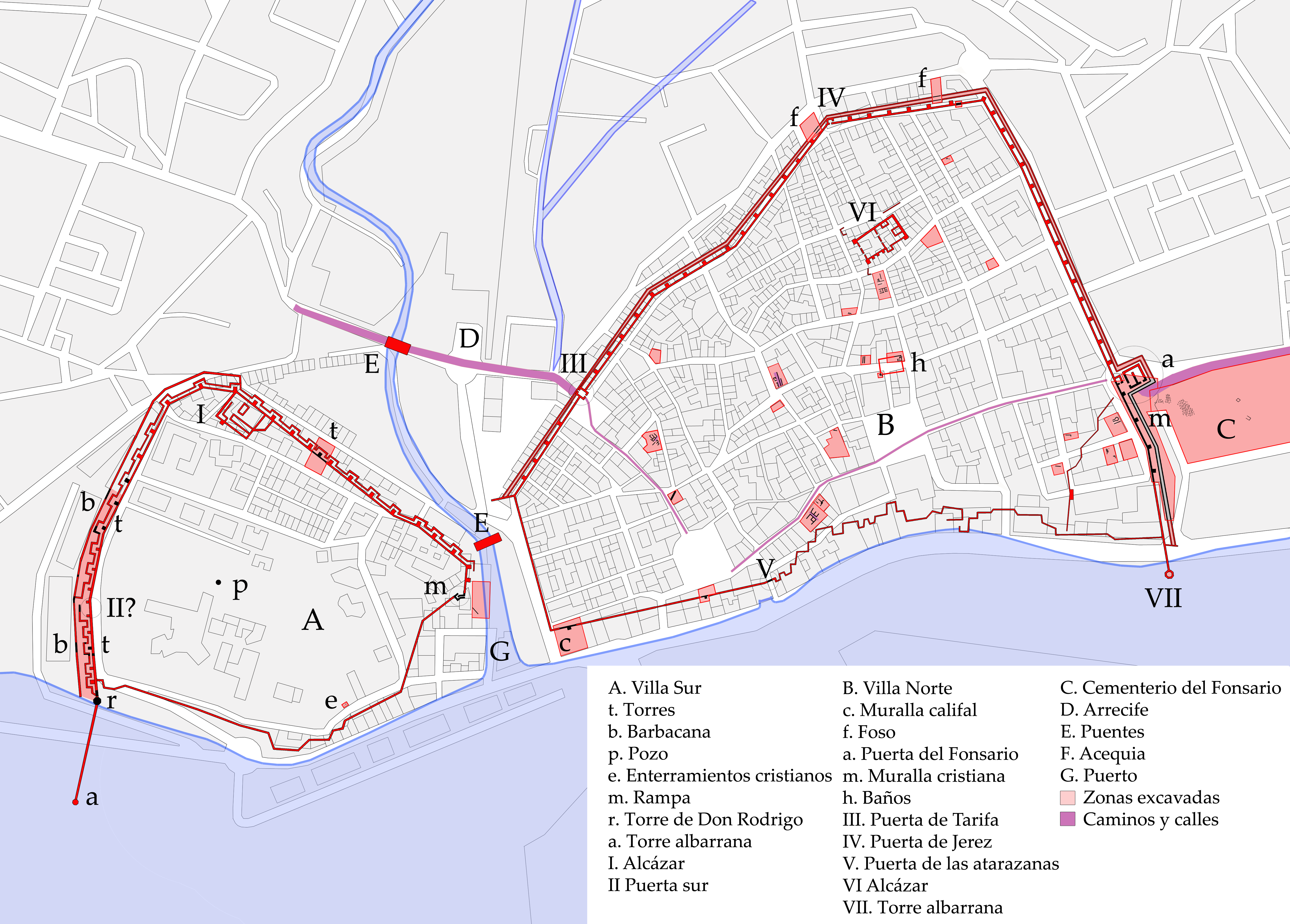 Plano de los principales yacimientos medievales de la ciudad de Algeciras indicando la ubicación de las dos villas según las últimas excavaciones realizadas en la localidad. Algeciras, Andalucía, España.